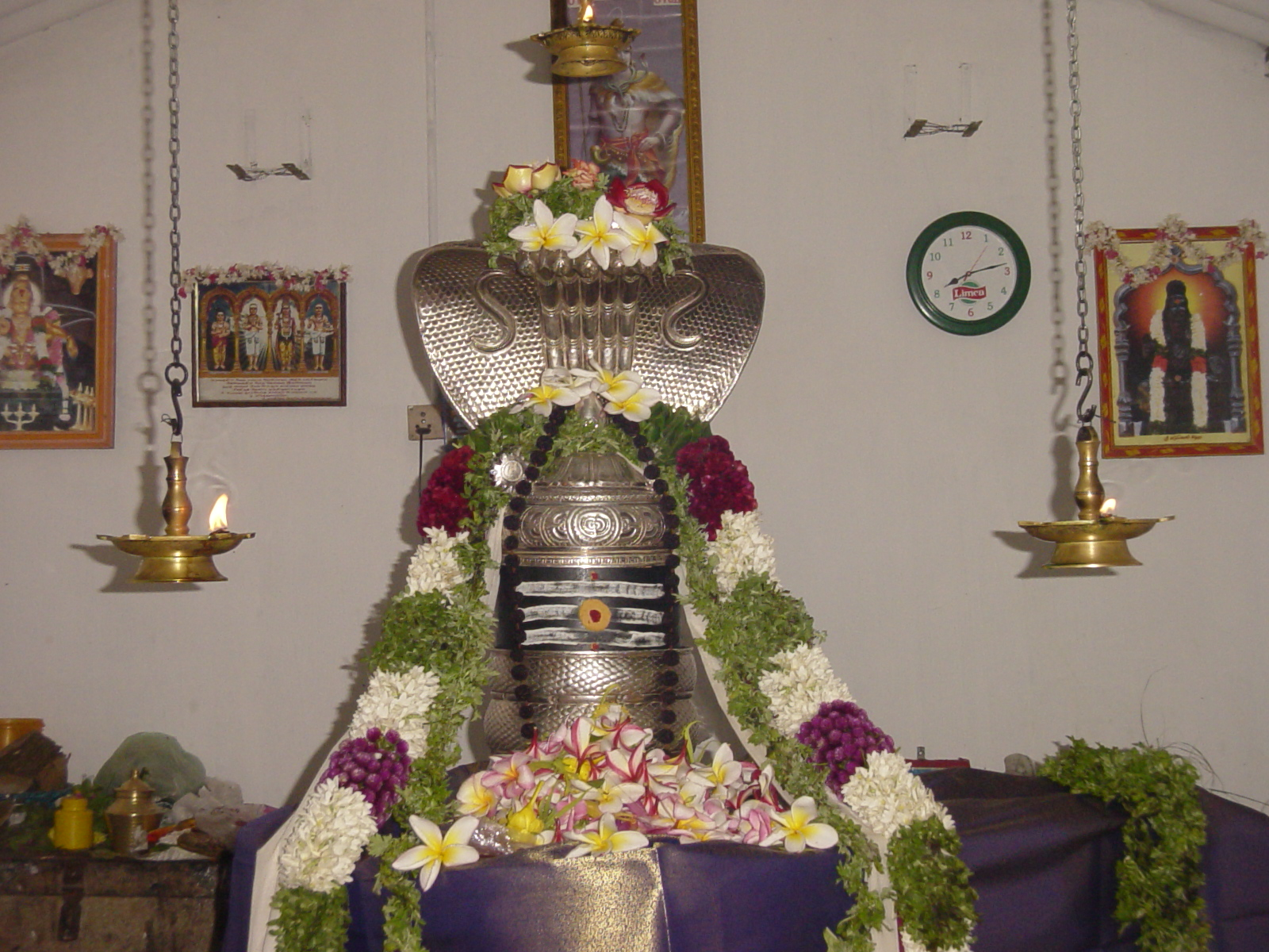 இராயப்புதுப்பாக்கம் அரசனேஸ்வரர் சிவலிங்கம்